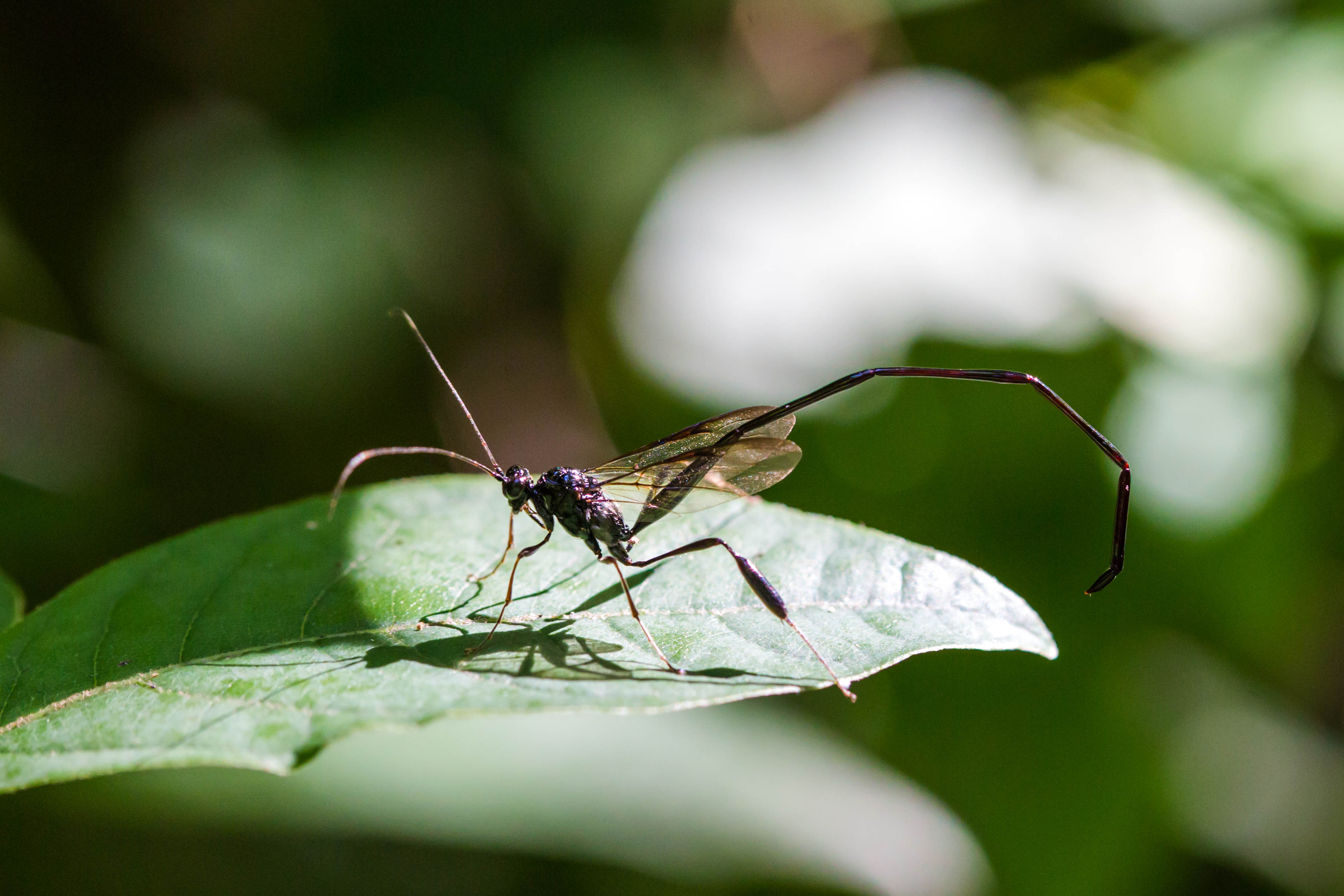 American pelecenid